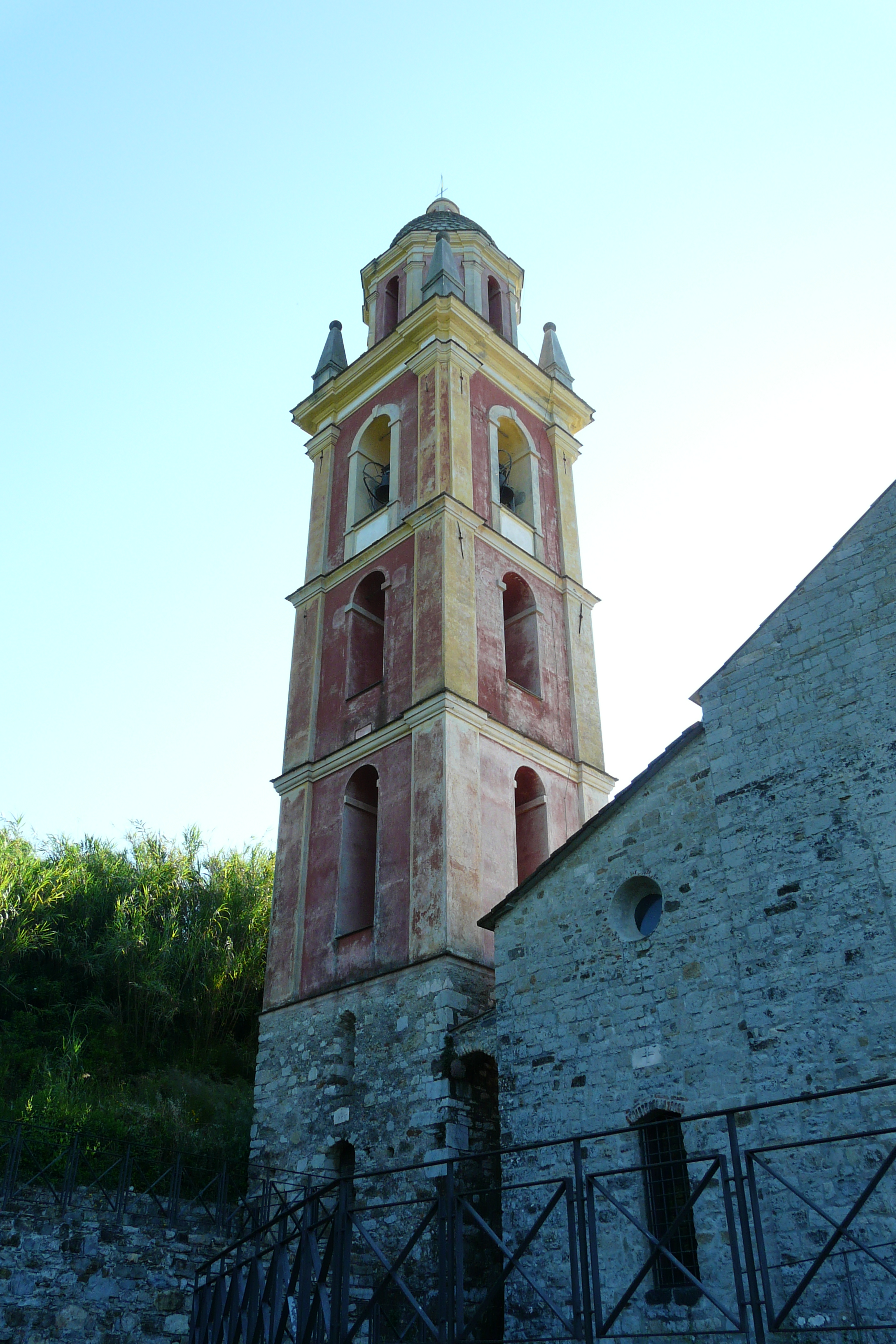 Chiesa romanica di Santa Maria Assunta, Vezzano Ligure, Liguria, Italia